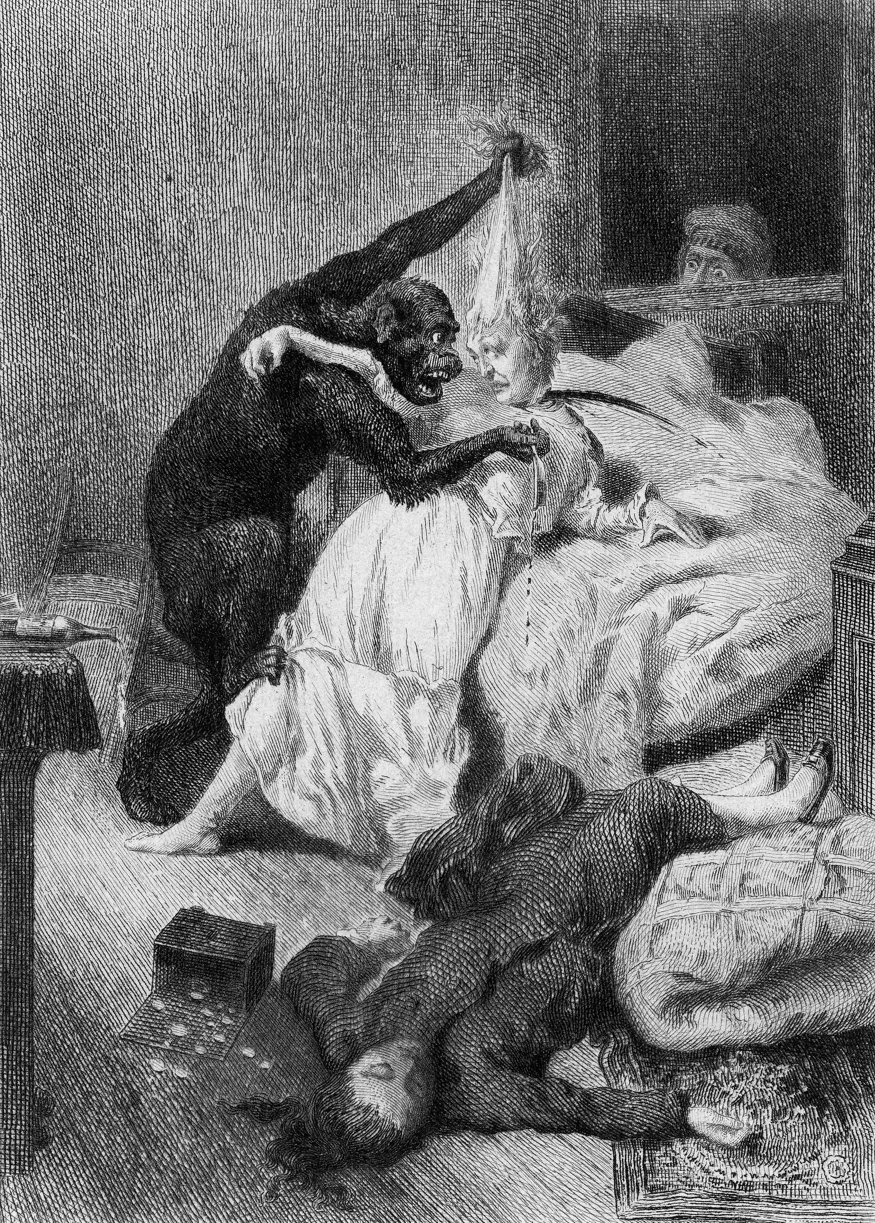 Иллюстрация к рассказу Эдгара По "Убийства на улице Морг"